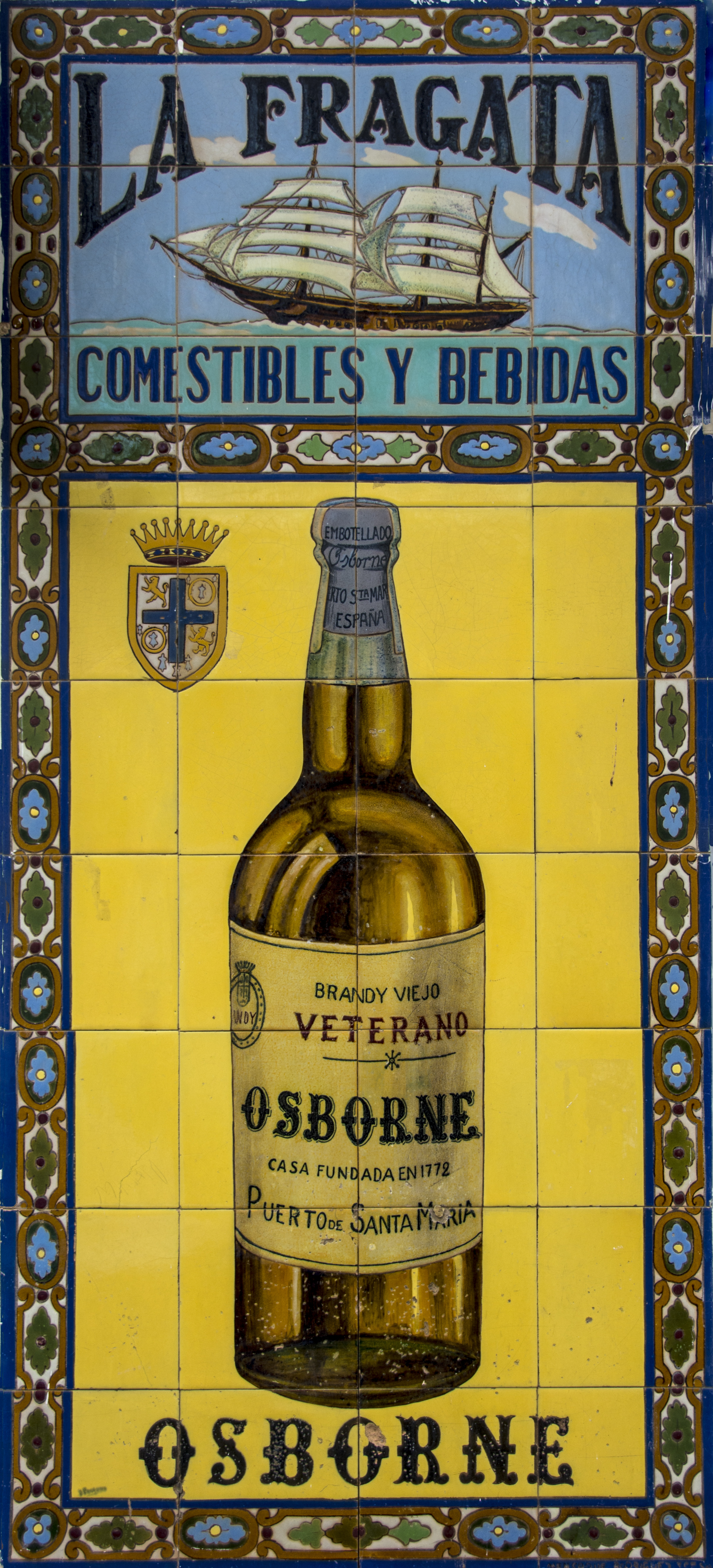 Anuncio publicitario de brandy veterano en Sevilla